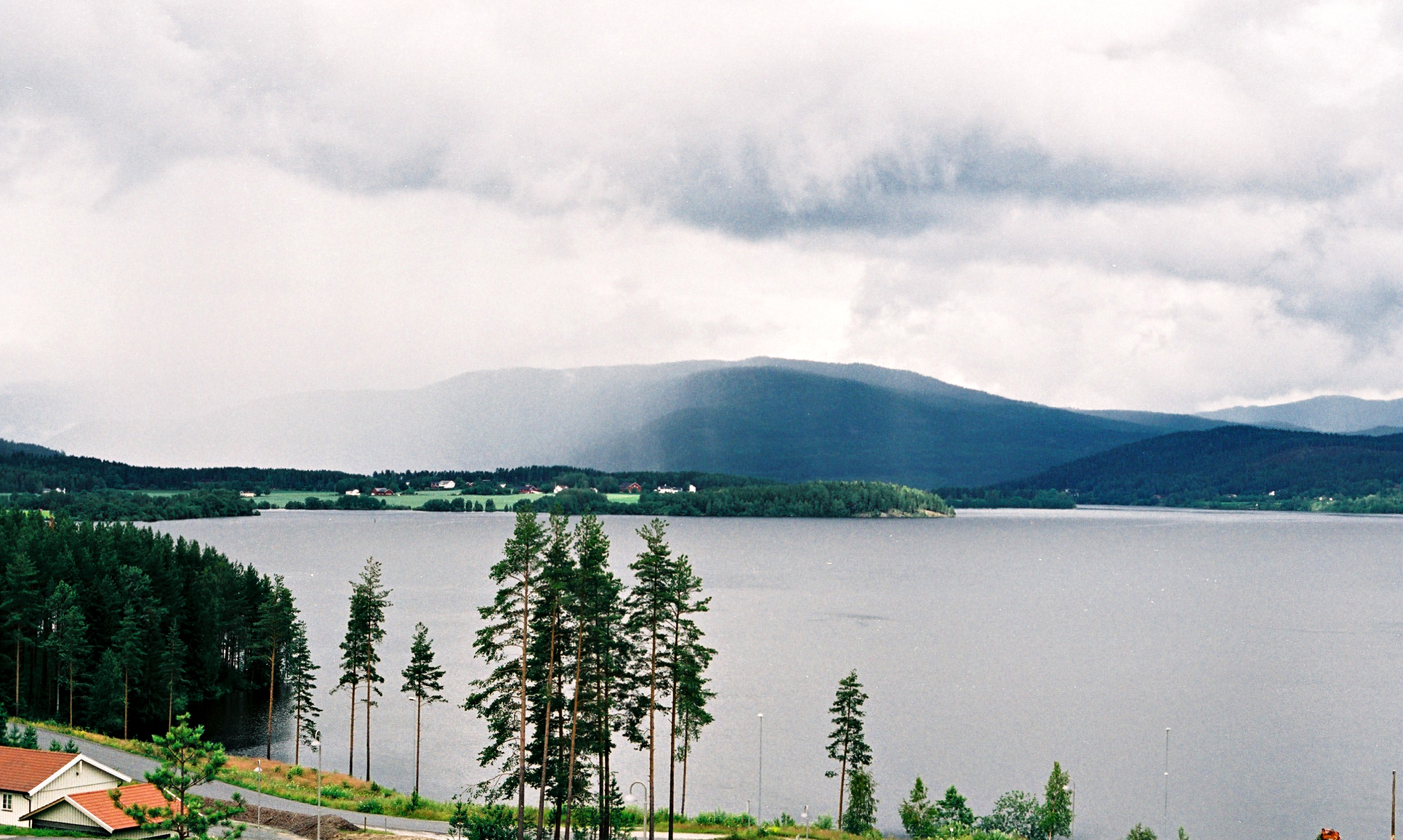 Utsikt over innsjøen Krøderen fra tettstedet Krøderen i sørenden av sjøen.